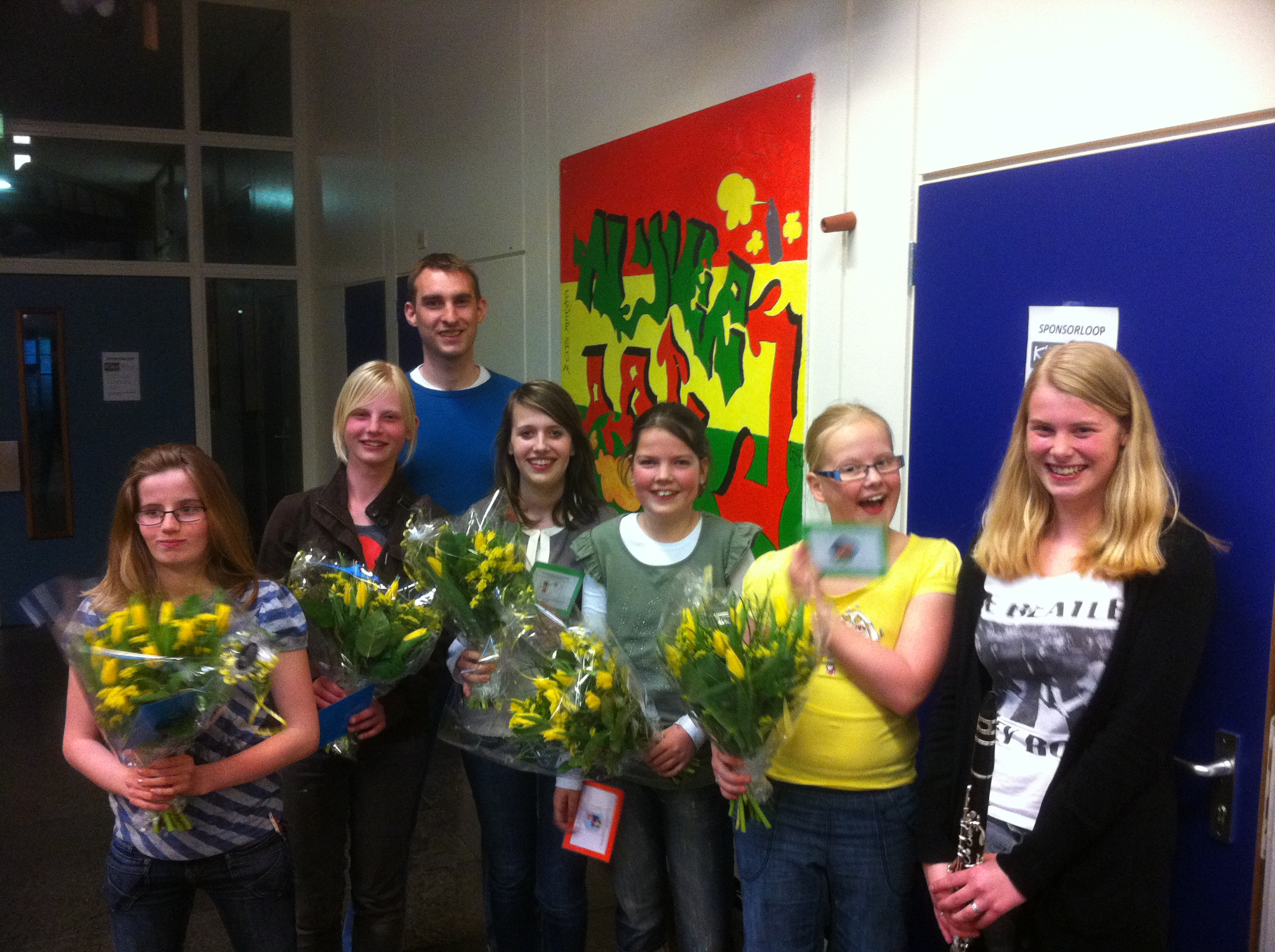 Leerlingen KSW geslaagd voor muziekexamens; Reggesteyn Nijverdal